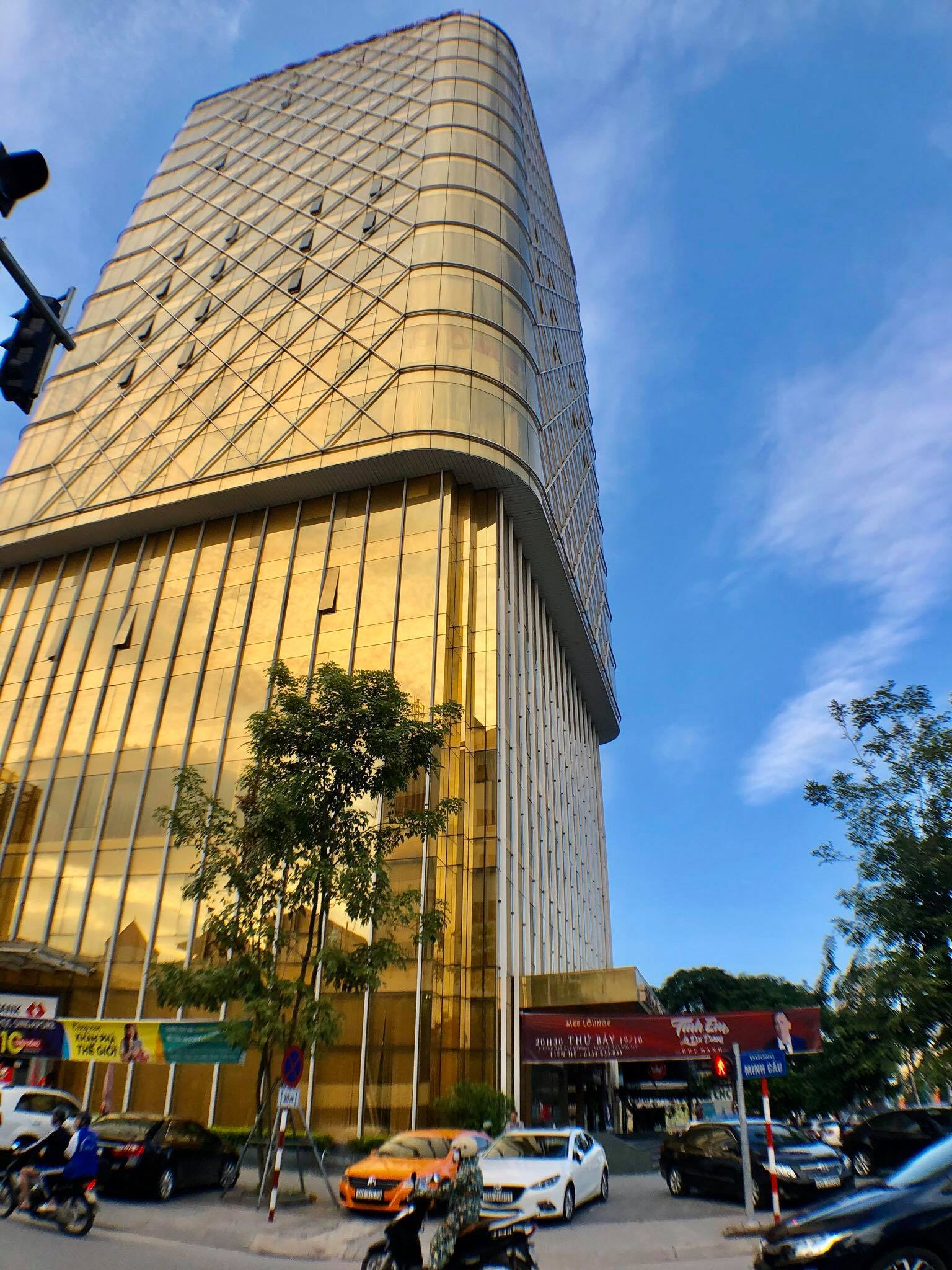 Tòa Nhà FCC Thái Nguyên